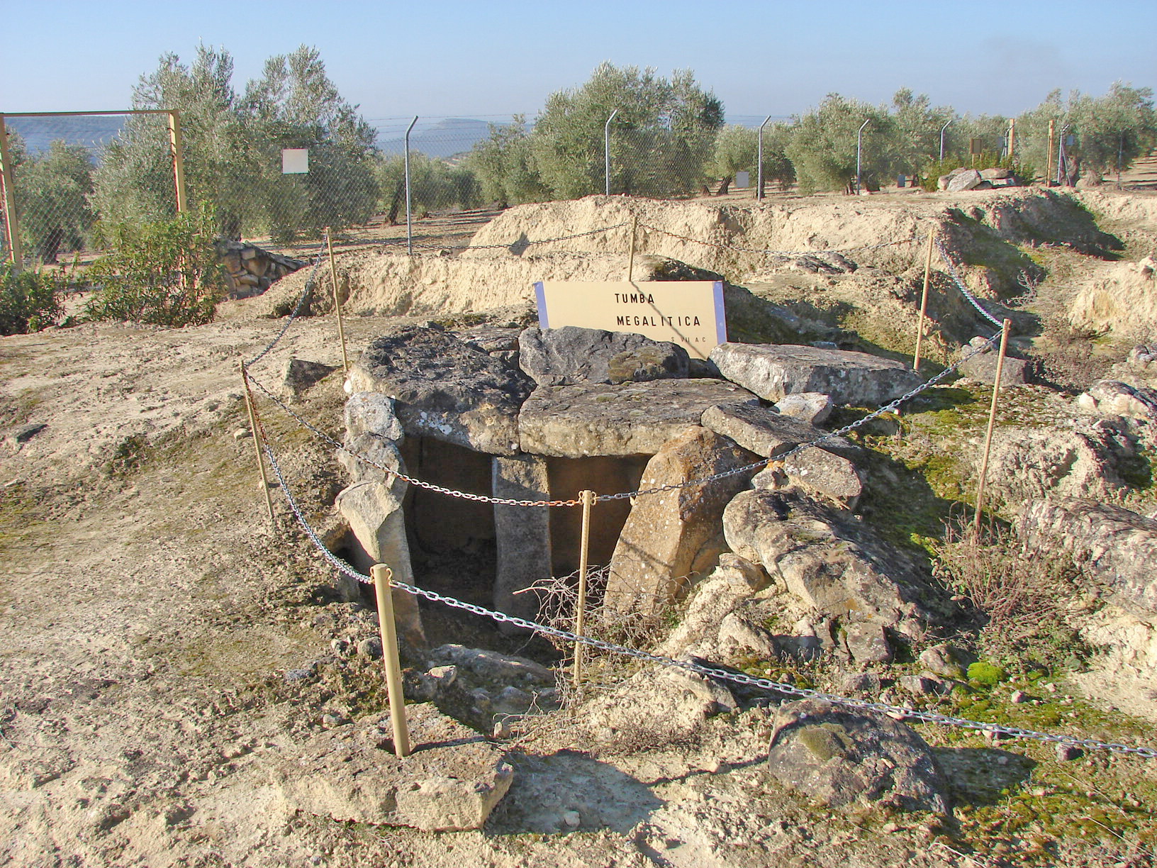 Tumba megalítica en el yacimiento arquelógico de Cerrillo Blanco, en Porcuna (Jaén, España).